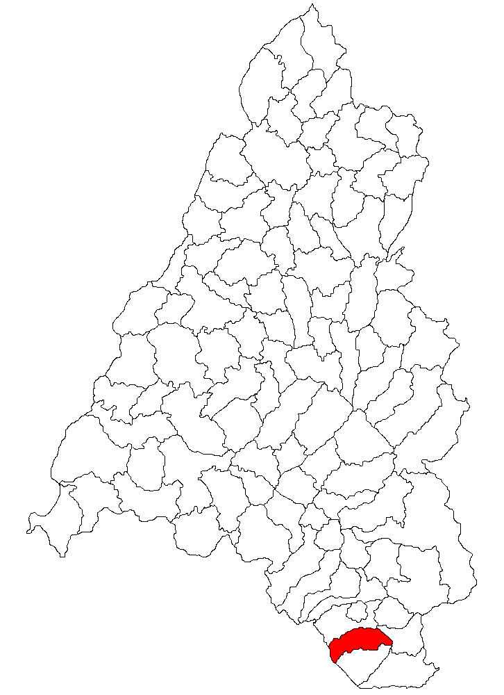 Categorie:Hărţi ale judeţului Bihor